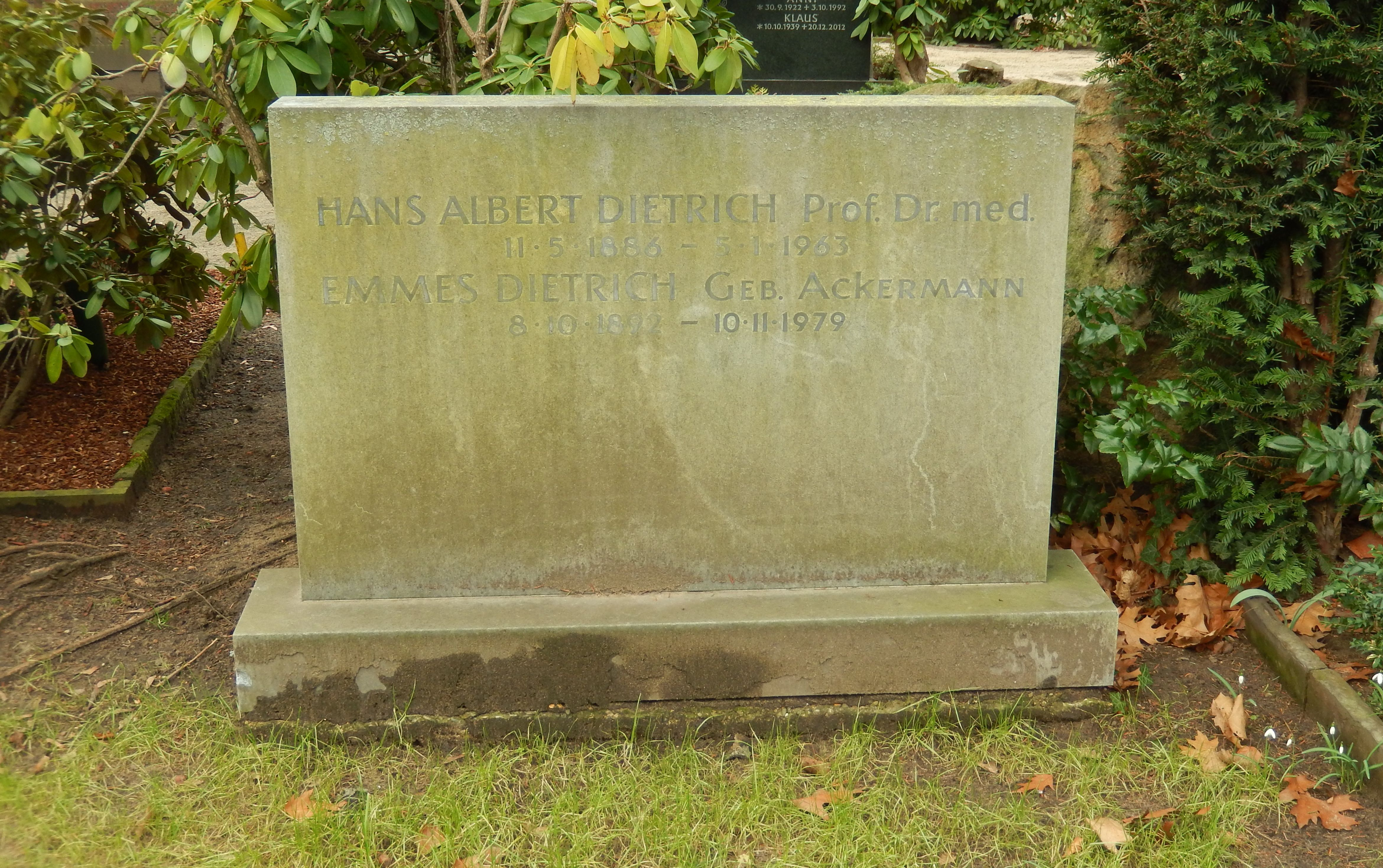 Grabstein des Gynäkologen und Hochschullehrers Hans Albert Dietrich und seiner Frau